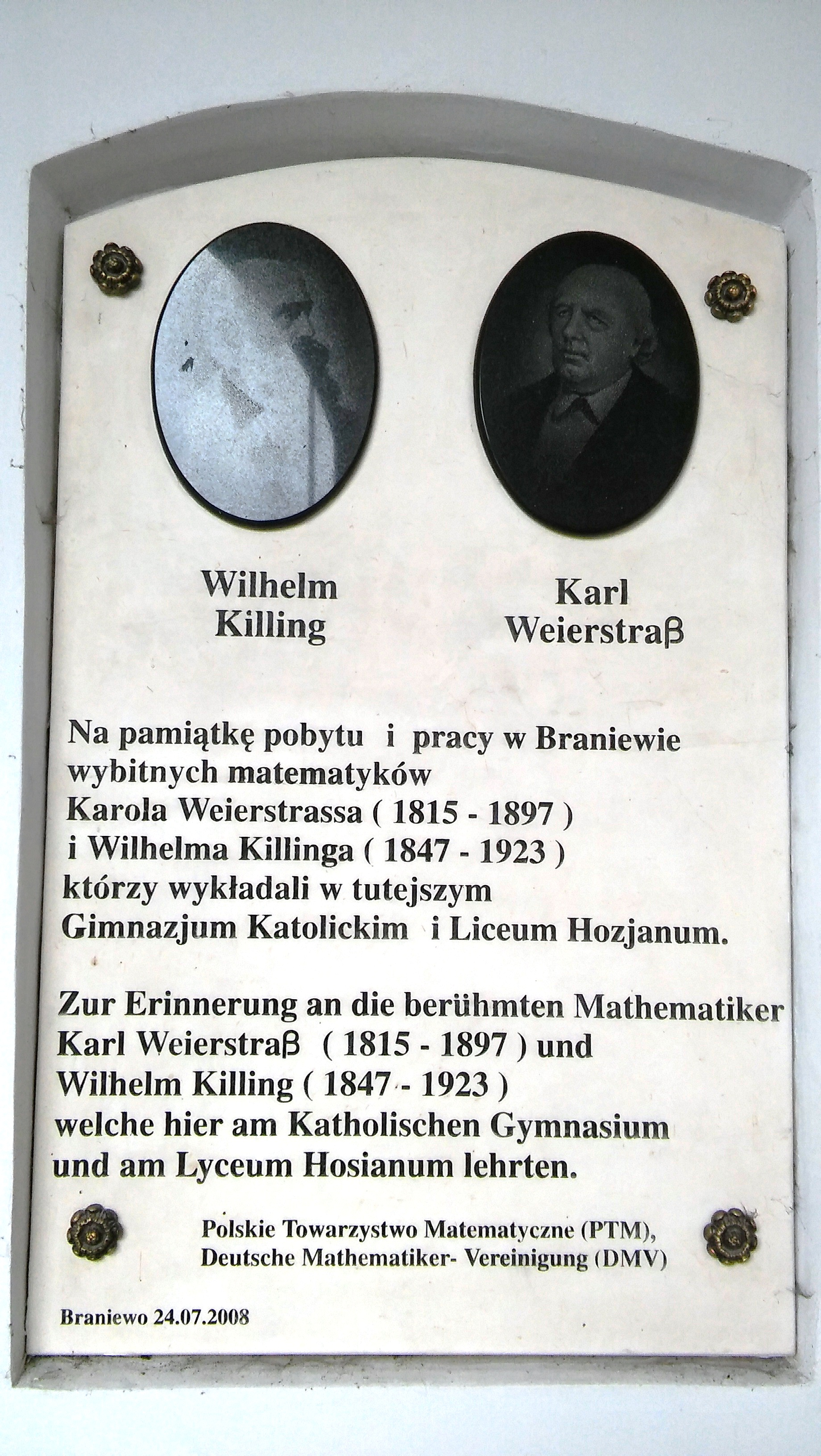 Karl Weierstraß Karol Weierstrass Wilhelm Killing